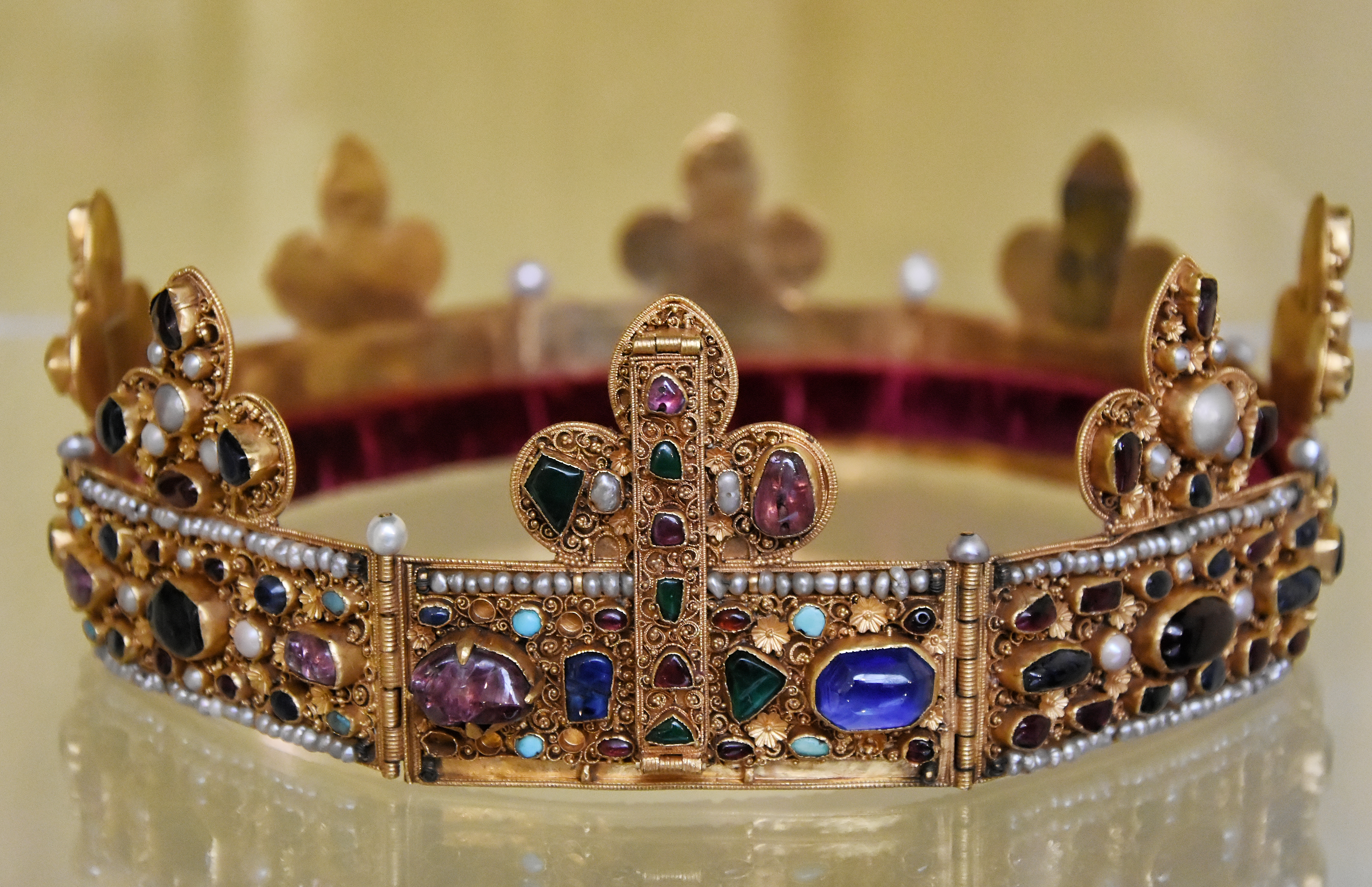 Kroon van Namen - begin 13e eeuw - Franse edelsmeedkunst - gouden kroon bestaande uit 8 plaatjes met spiraalvormig filigraanwerk, stenen en parels - Beschermde kunstschatten kathedraal Namen